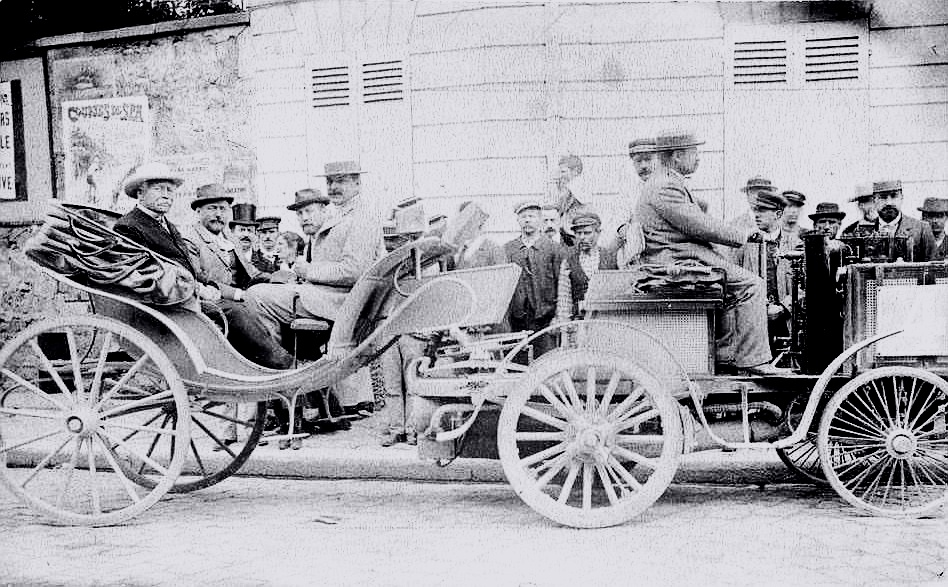 Le comte Jules-Albert de Dion, à l'arrière de sa voiture à boggie -genre Victoria- à Mantes (Paris-Rouen 1894), Voitures sans chevaux. Concours organisé par le Petit Journal, 22 juillet 1894, coll. R.Girard, BNF / Gallica